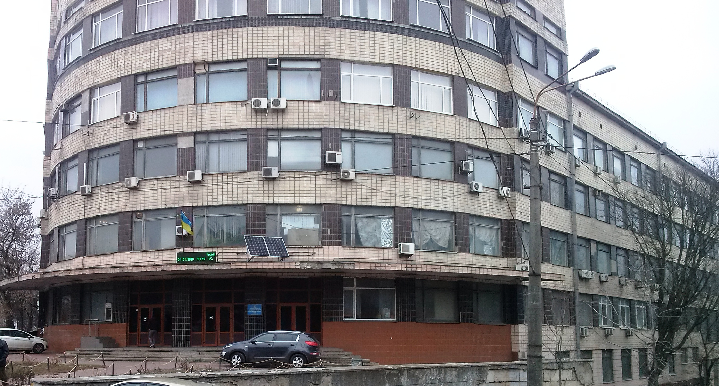 Здание Института полупроводников имени Лашкарева, Киев, проспект Науки